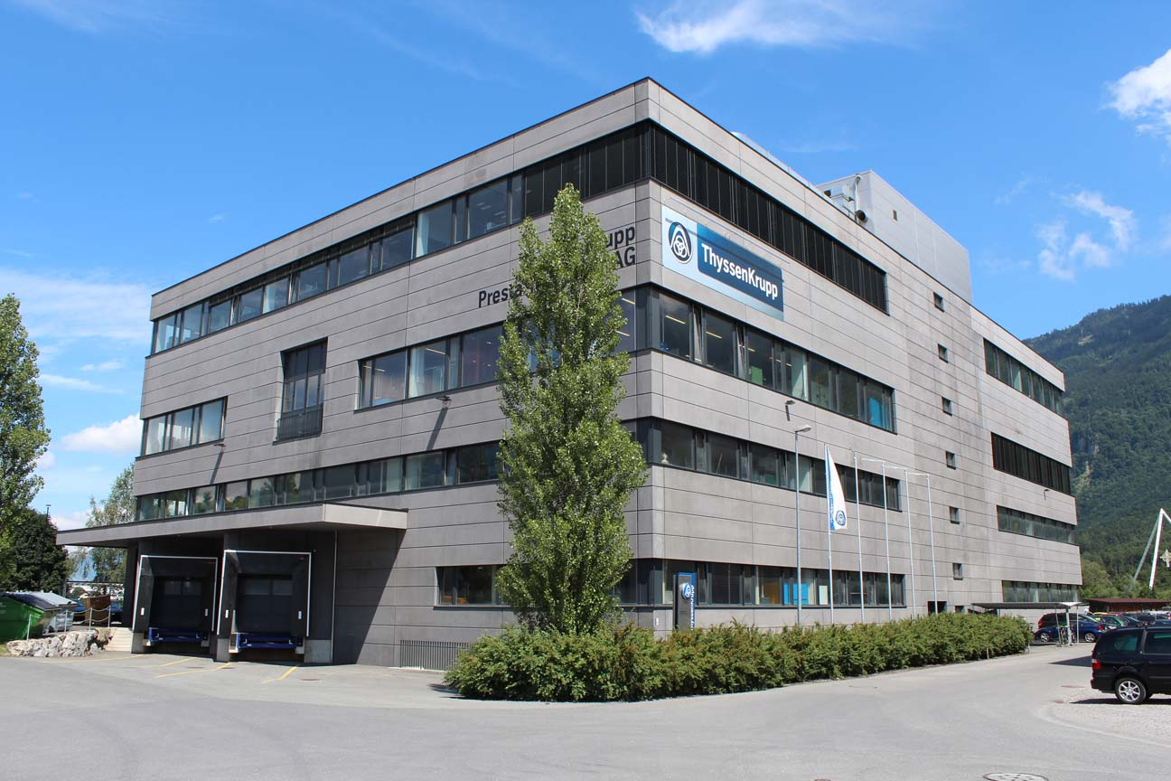 ThyssenKrupp Presta TecCenter